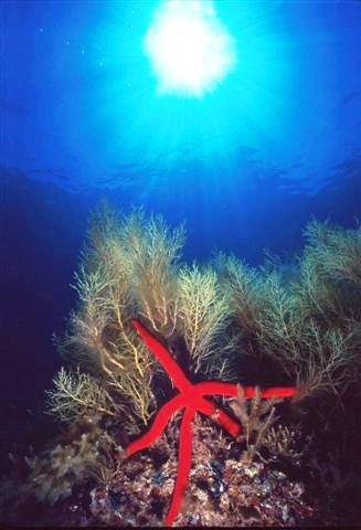 Area Marina Protetta Capo Gallo, Palermo, Sicily Ophidiaster ophidianus